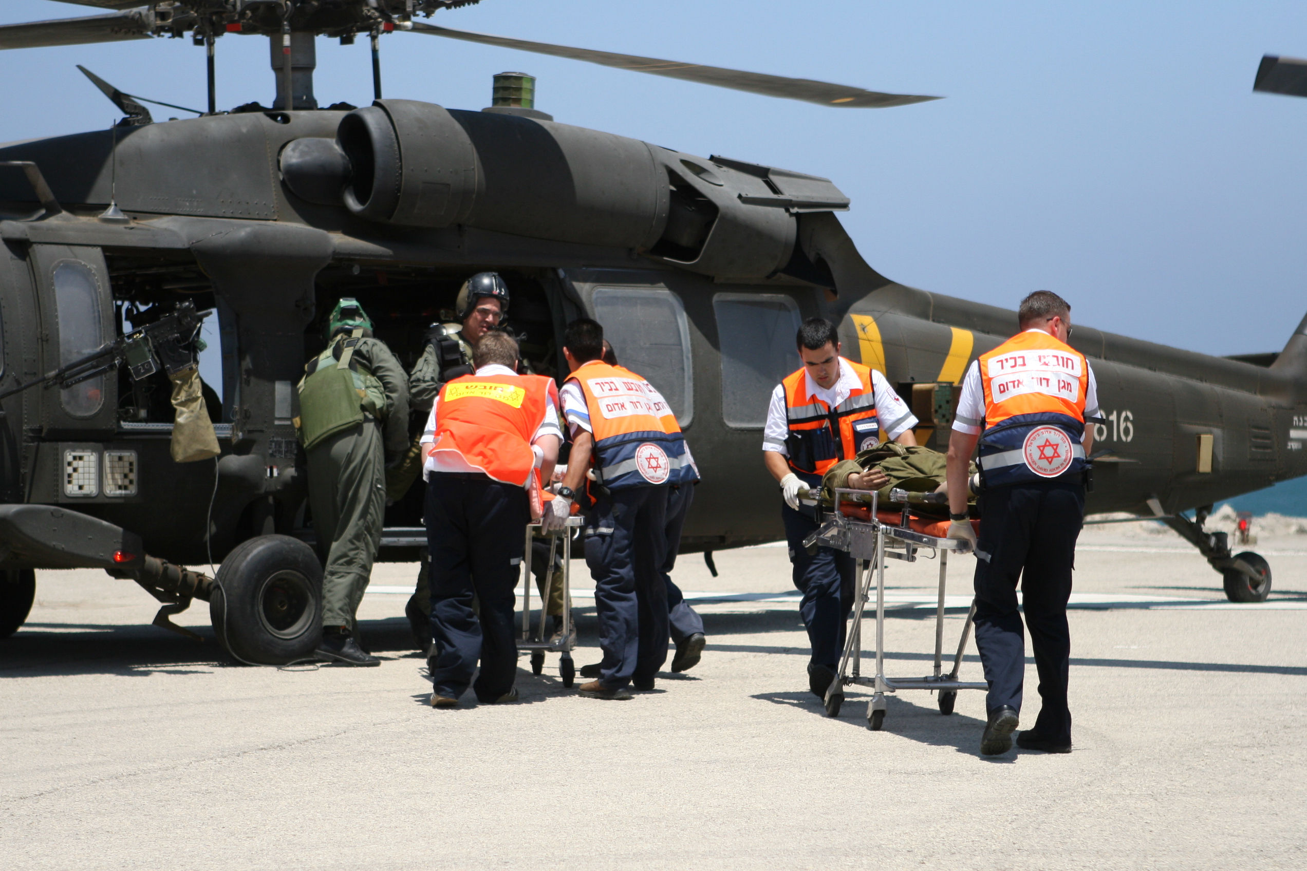 קליטת נפגעים במנחת המסוקים בביה"ח רמב"ם